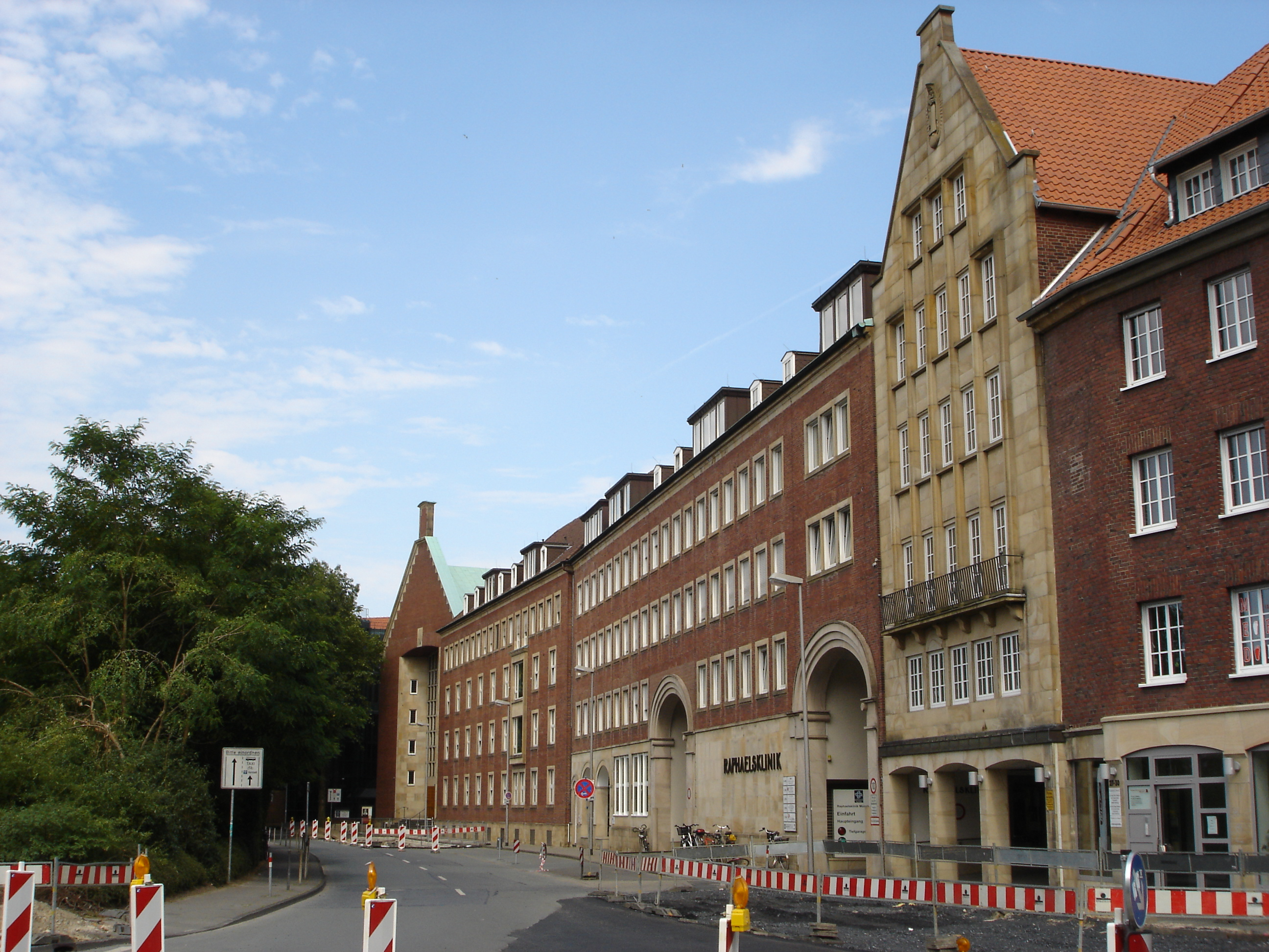 Portalseite mit Ein- und Ausfahrt der Raphaelsklinik in Münster, Westfalen, Deutschland. Am linken Ende des Gebäudes befindet sich der Eingang zur Kapelle